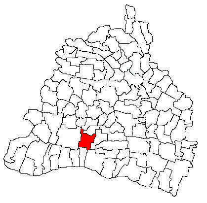 Amplasarea în cadrul județului.